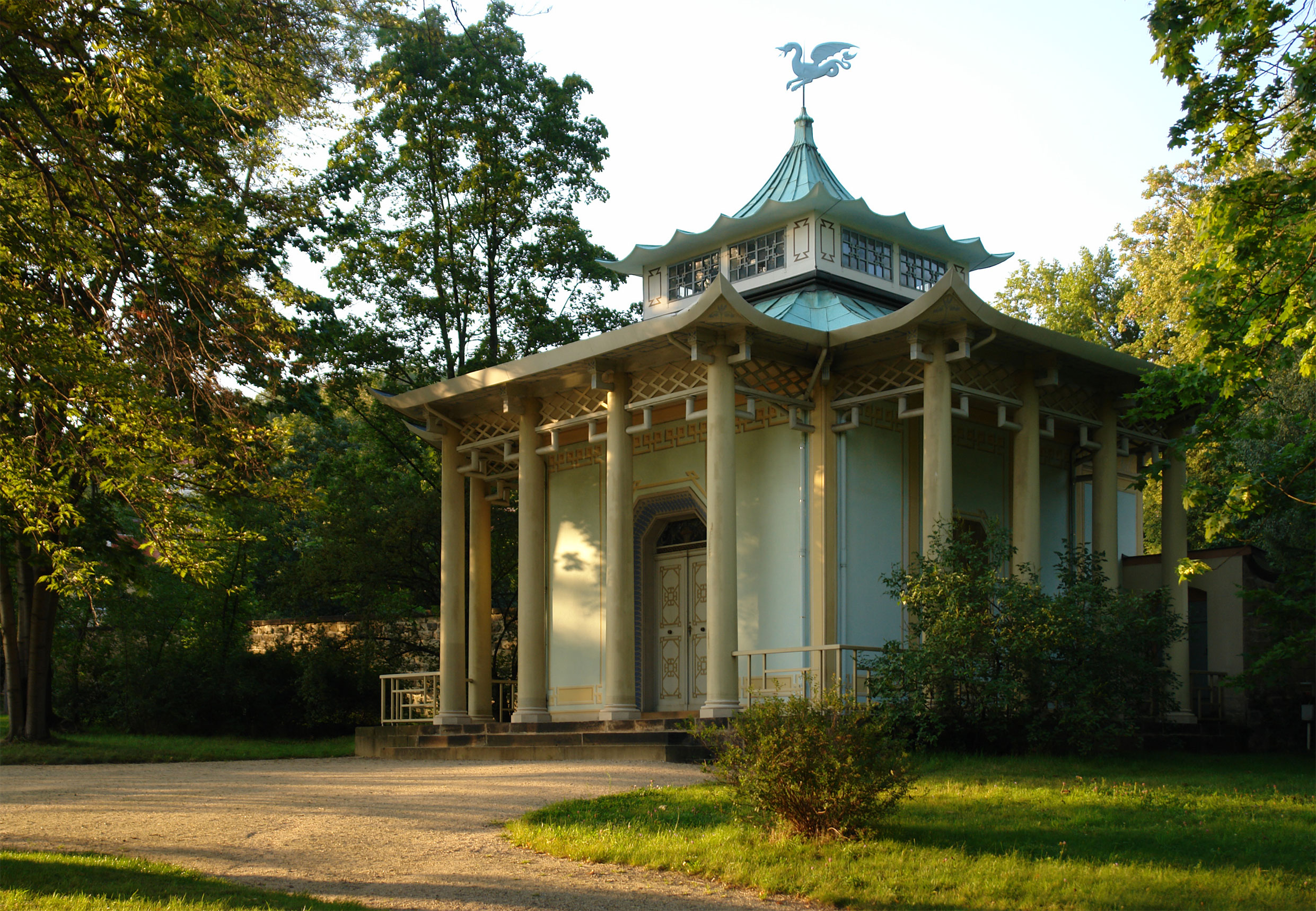 Schlosspark Pillnitz, chinesischer Pavillion